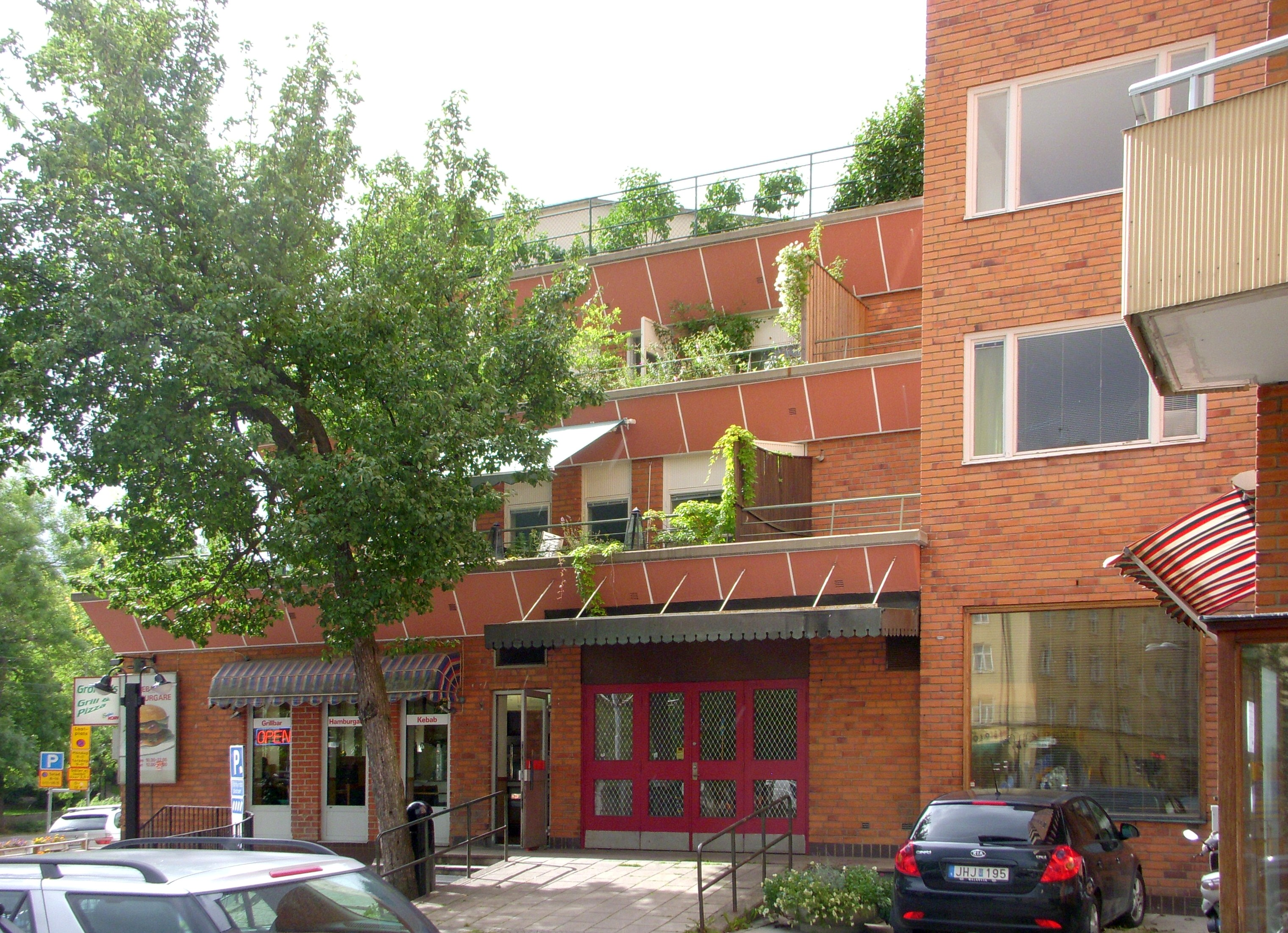 Terrasshusen Gröndal, gaveln mot öst